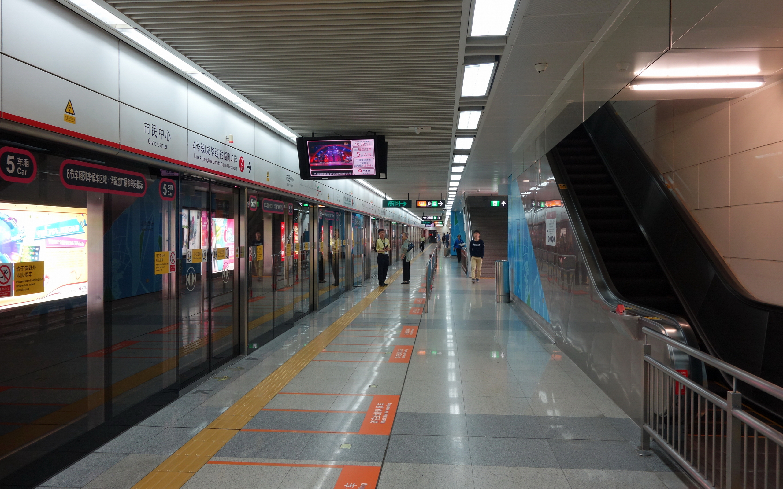 深圳地铁4号线（龙华线）市民中心站